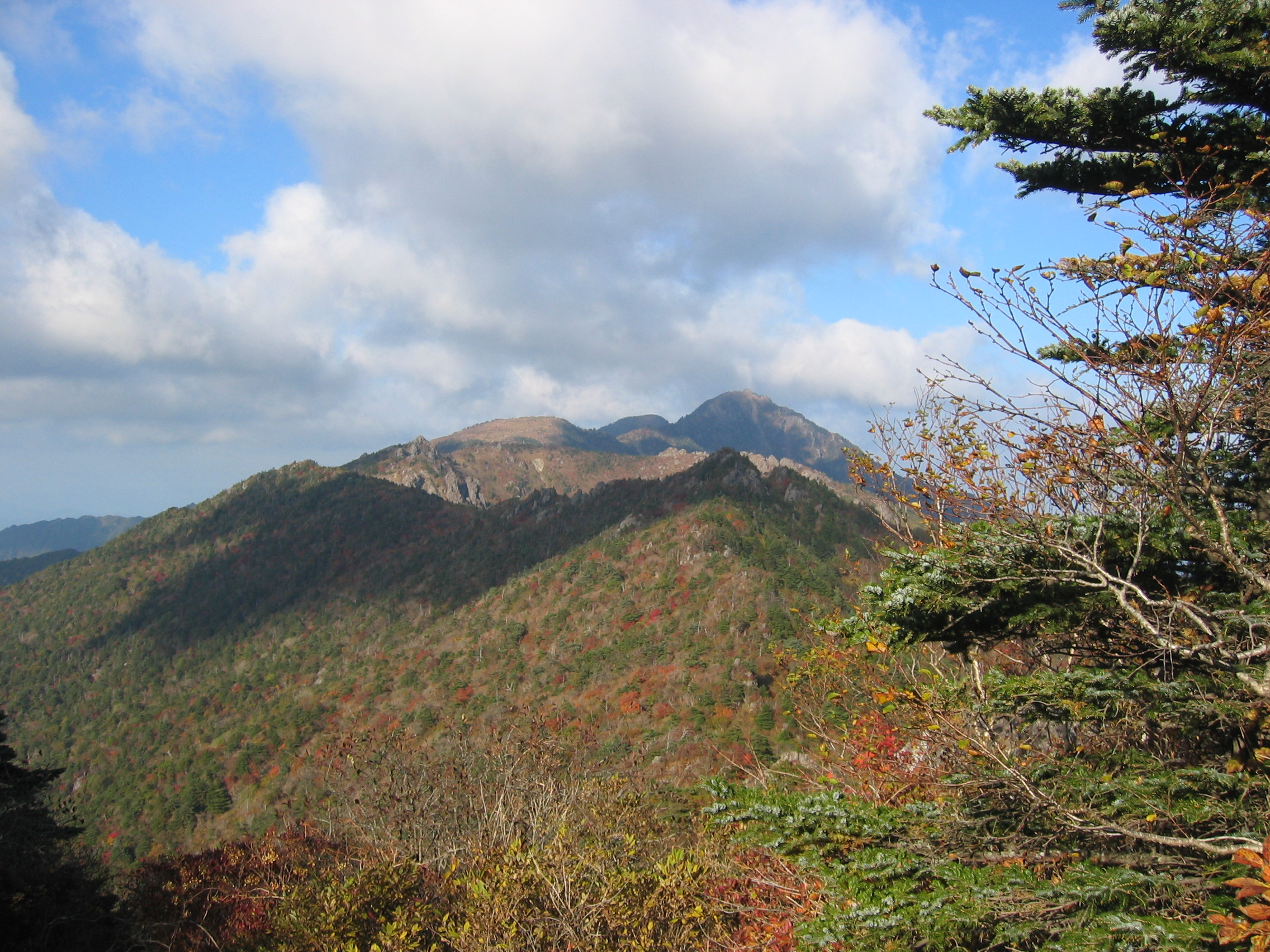 2006년 대한민국 지리산의 모습 The scenery of Jirisan, in South Korea, 2006